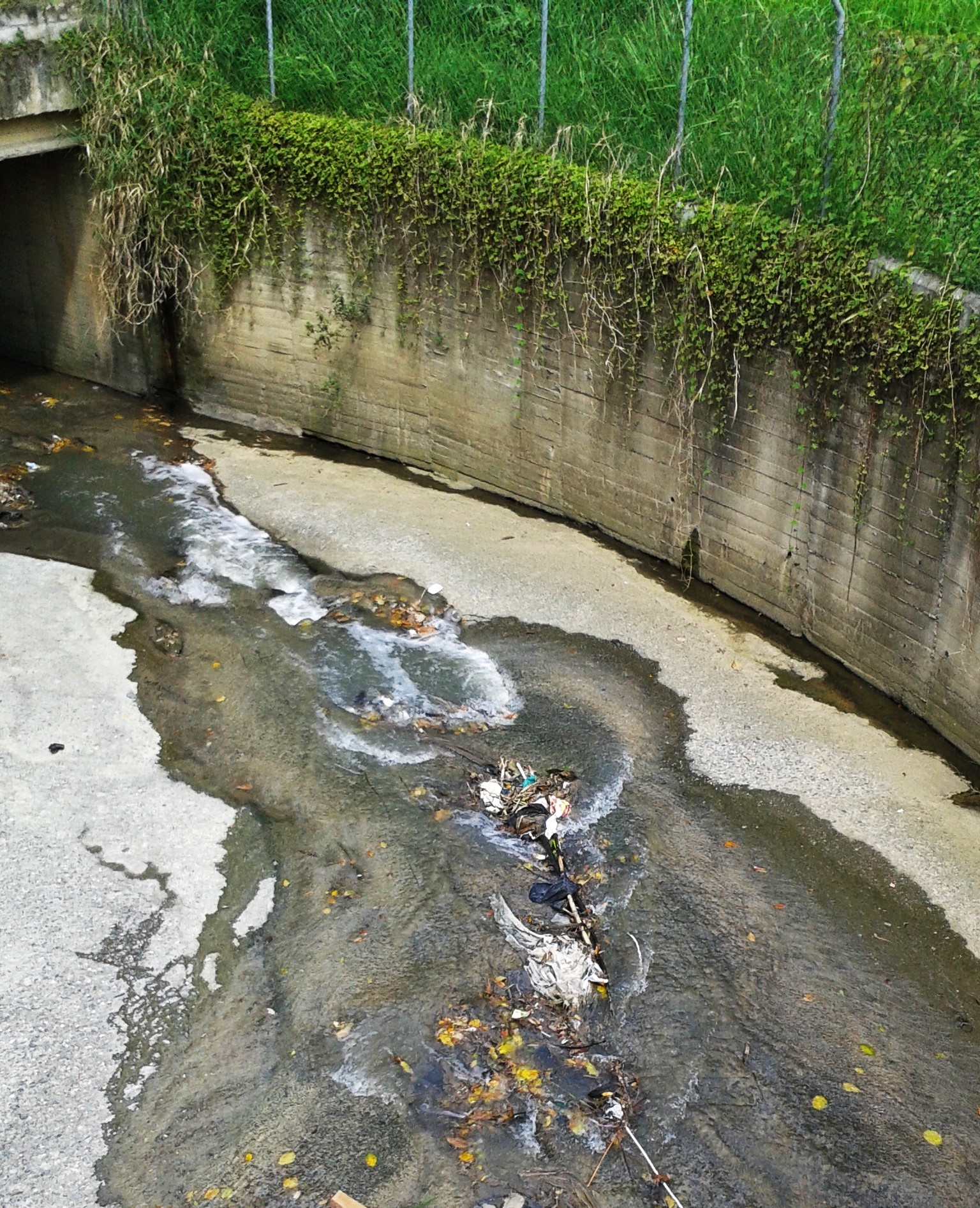 Quebrada La Guayabala, Medellín